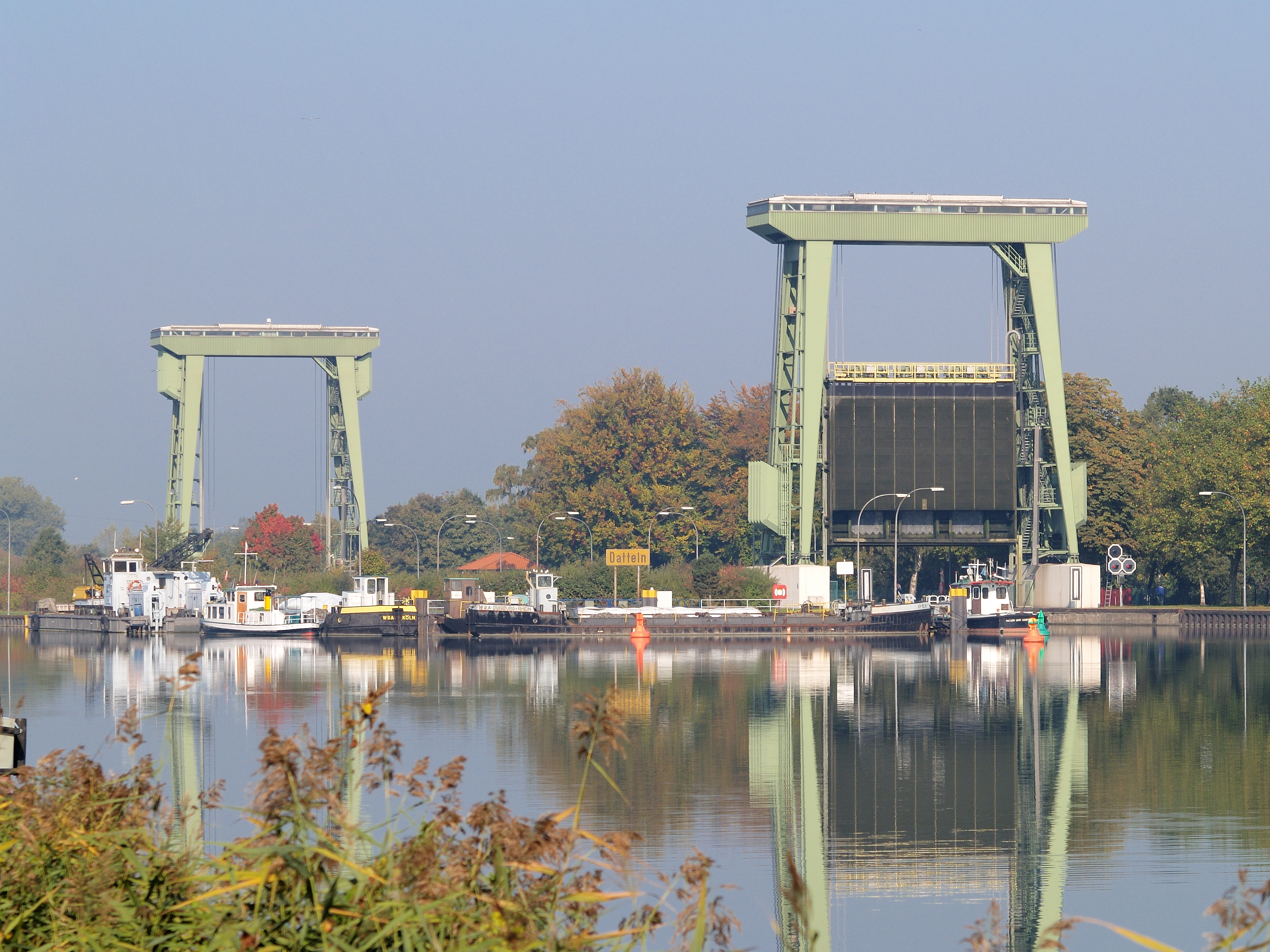 Schleuse Datteln am Wesel-Datteln-Kanal (WDK), Oberwasser